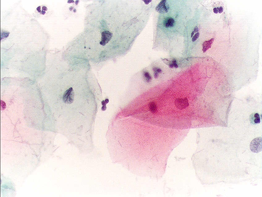 Pap test, Papanicolau stain, 400x. Normal squamous epithelial cells in a premenopausal women.